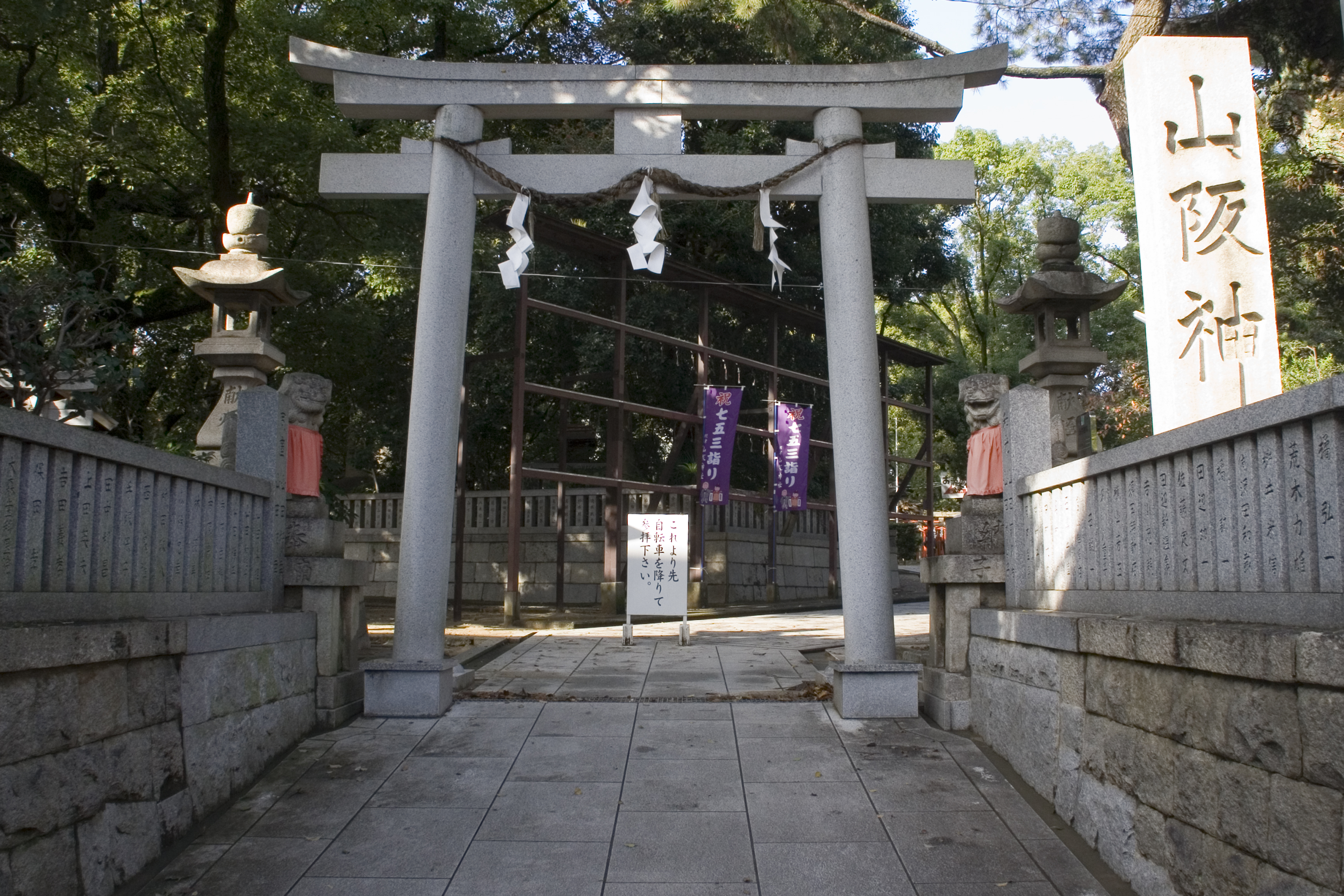 山阪神社 (大阪市) 鳥居